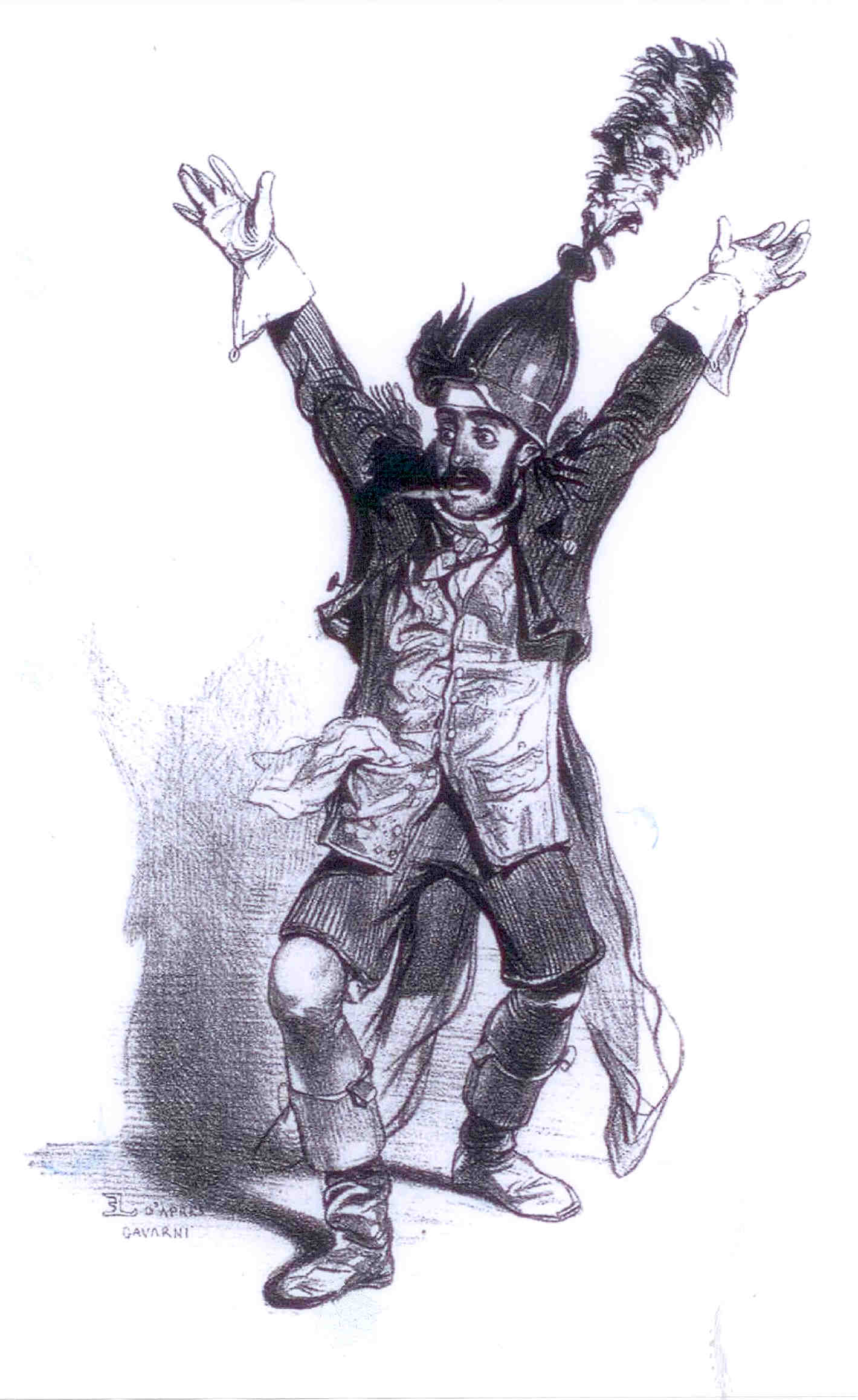 Portrait du célèbre danseur et héros du Carnaval de Paris Levesque dit Chicard